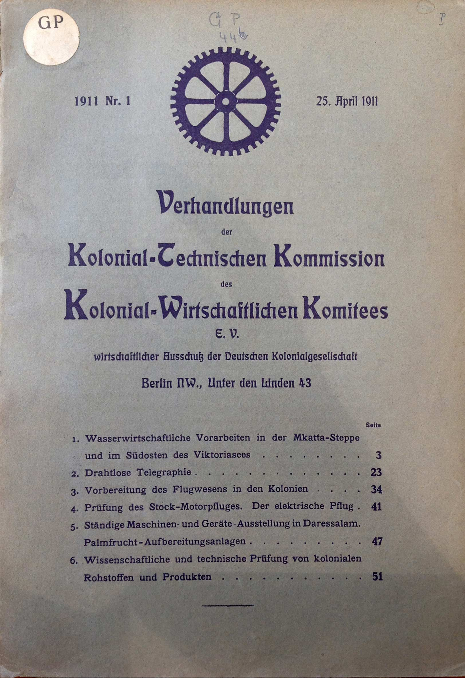 Titelblatt des Sitzungshefts der Kolonialtechnischen Kommission vom April 1910